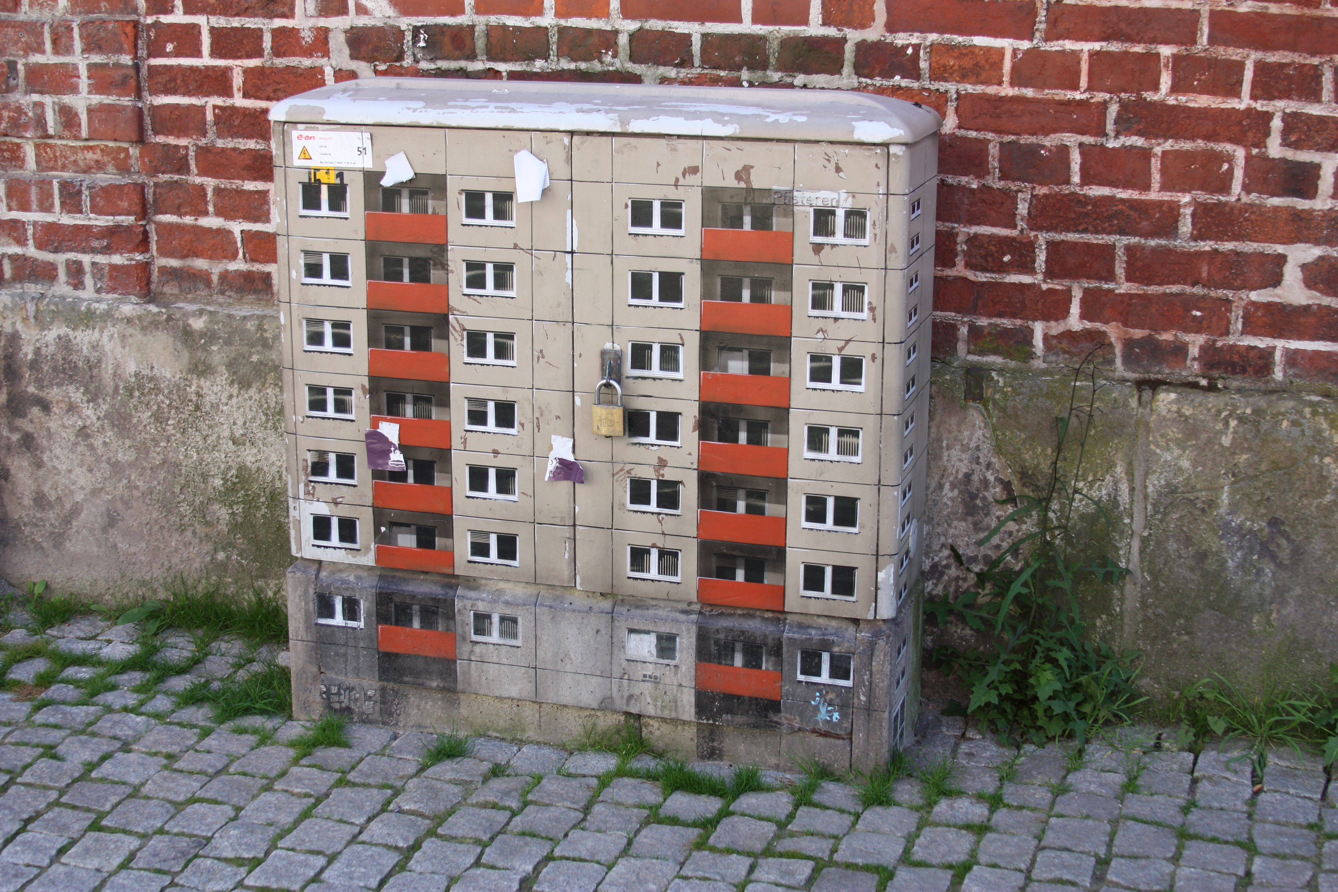 Evol: einer von 15 im Rahmen der ARTotale bemalten Stromkasten in Lüneburg